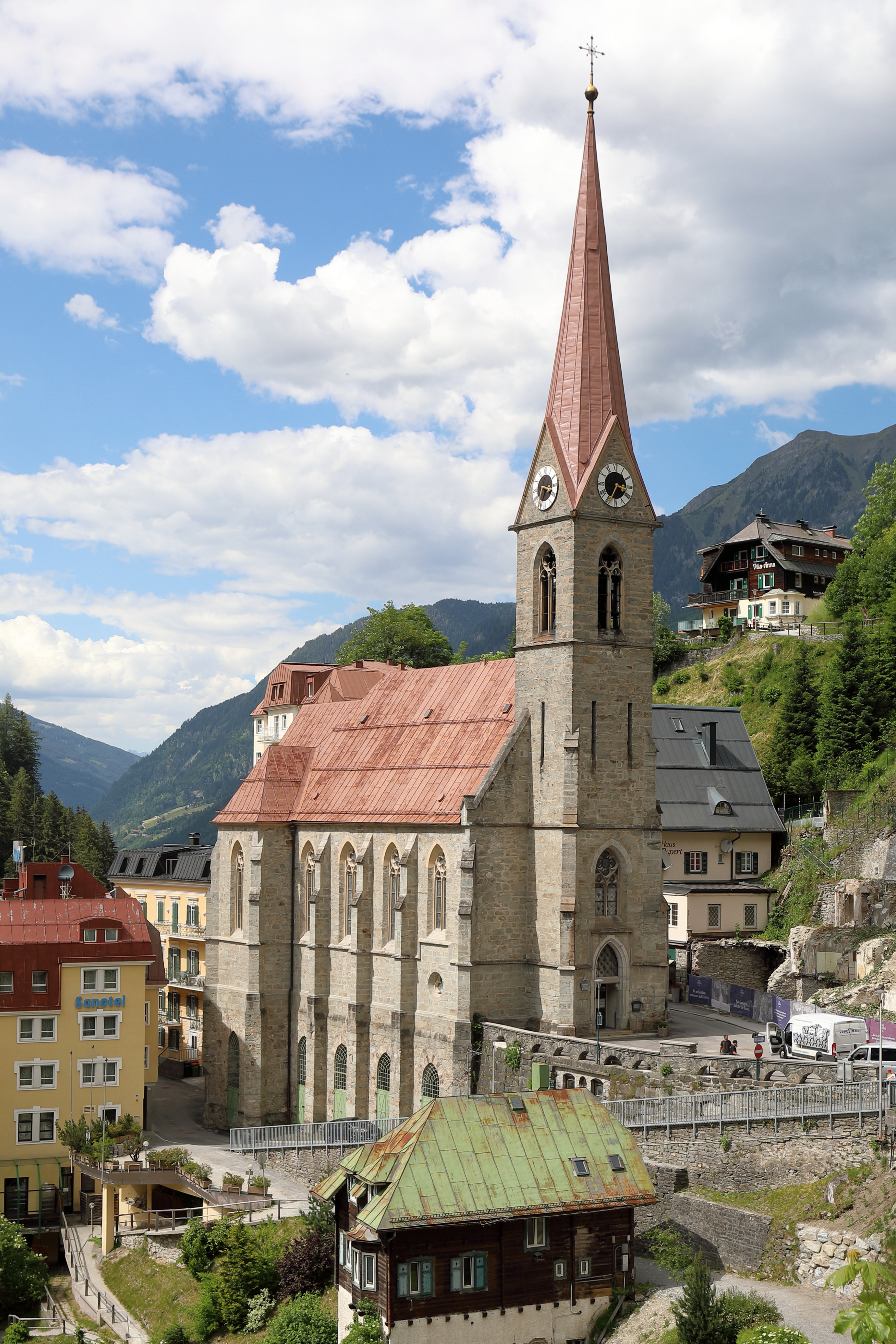 Südansicht der röm.-kath. Pfarrkirche hl. Primus und hl. Felizian in der Salzburger Gemeinde Bad Gastein.Die neogotische Kirche wurde anstelle einer baufälligen Vorgängerkirche ab 1866 (Grundsteinlegung am 14. Februar) errichtet und am 27. November 1876 feierlich geweiht. Den Plan für die einschiffige, nach Norden ausgerichtete Kirche mit Südturm lieferte der k.k. Bezirksingenieur Pieschel. Den Bau führte der Salzburger Baumeister Jacob Ceconi aus. Der Dombaumeister Friedrich von Schmidt lieferte die Zeichnungen für die Einzelheiten und die Einrichtungen.